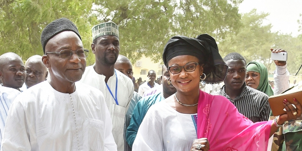 Saleh Kebzabo et son épouse qui sortaient du bureau de vote aux élections présidentielles de 2016